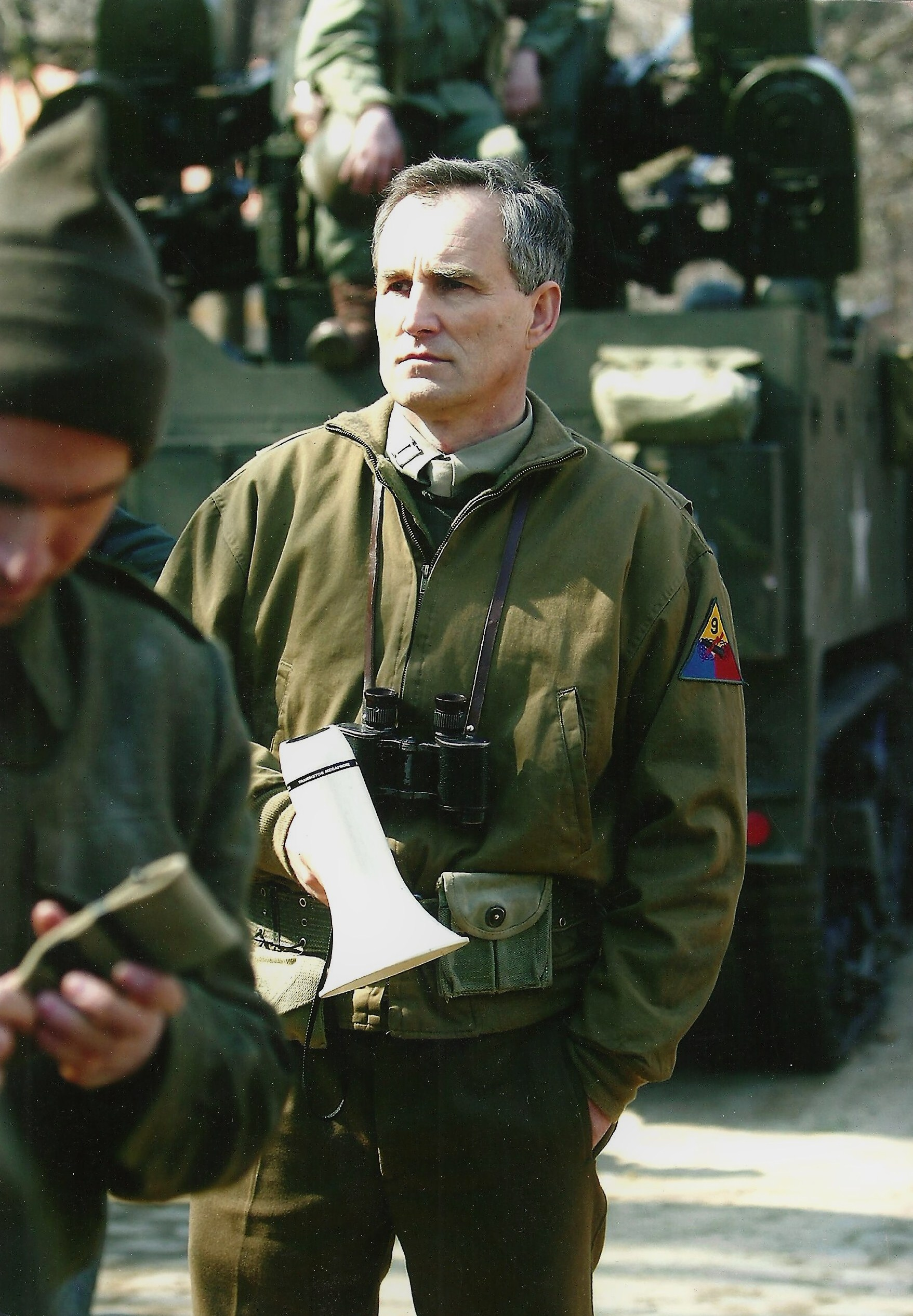 Andrzej Szczytko jako Thomas Gregg, podczas pracy nad serialem "Tajemnica twierdzy szyfrów".